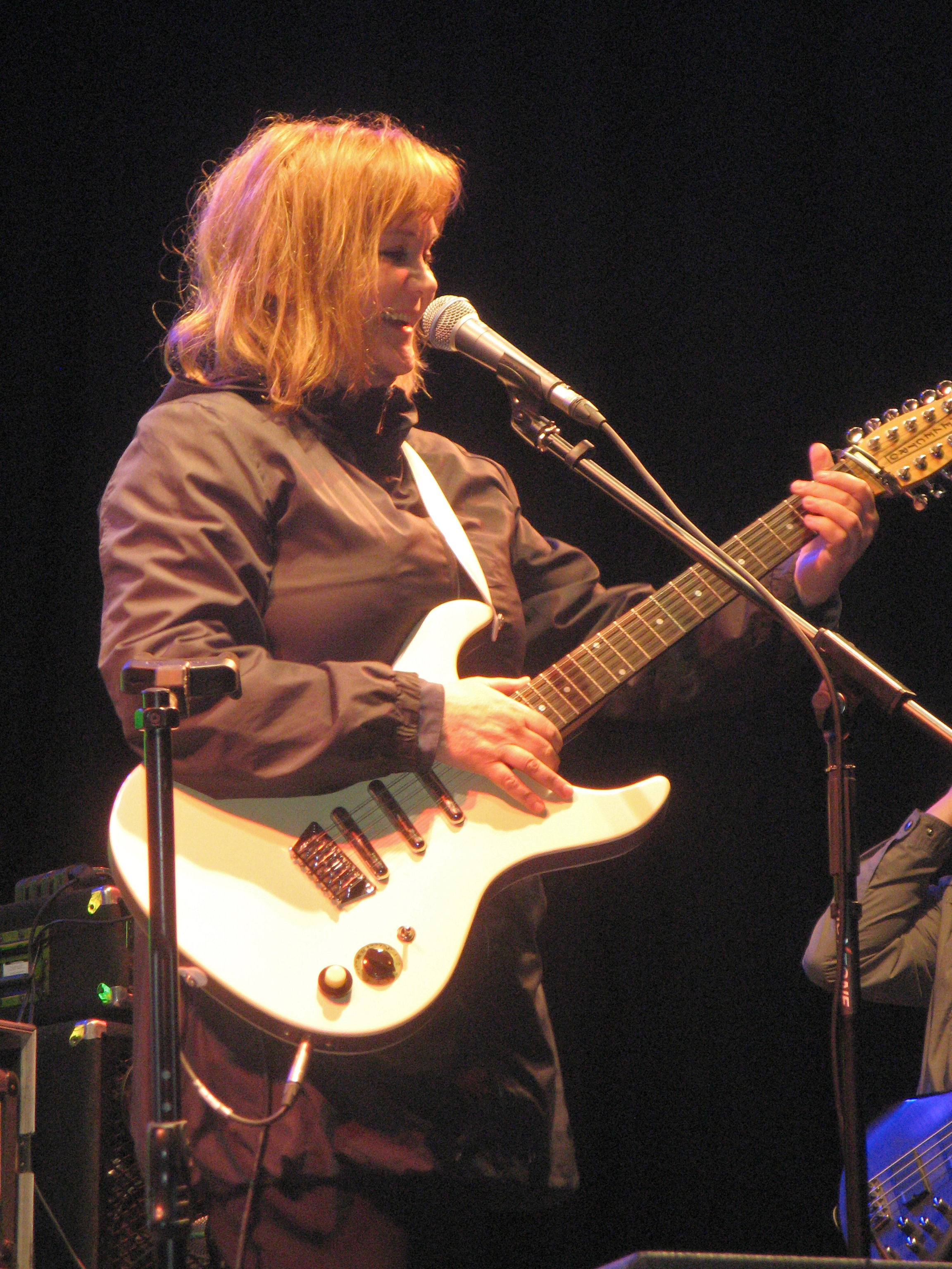 Группа "Настя" на фестивале "Rock-Line 2017"